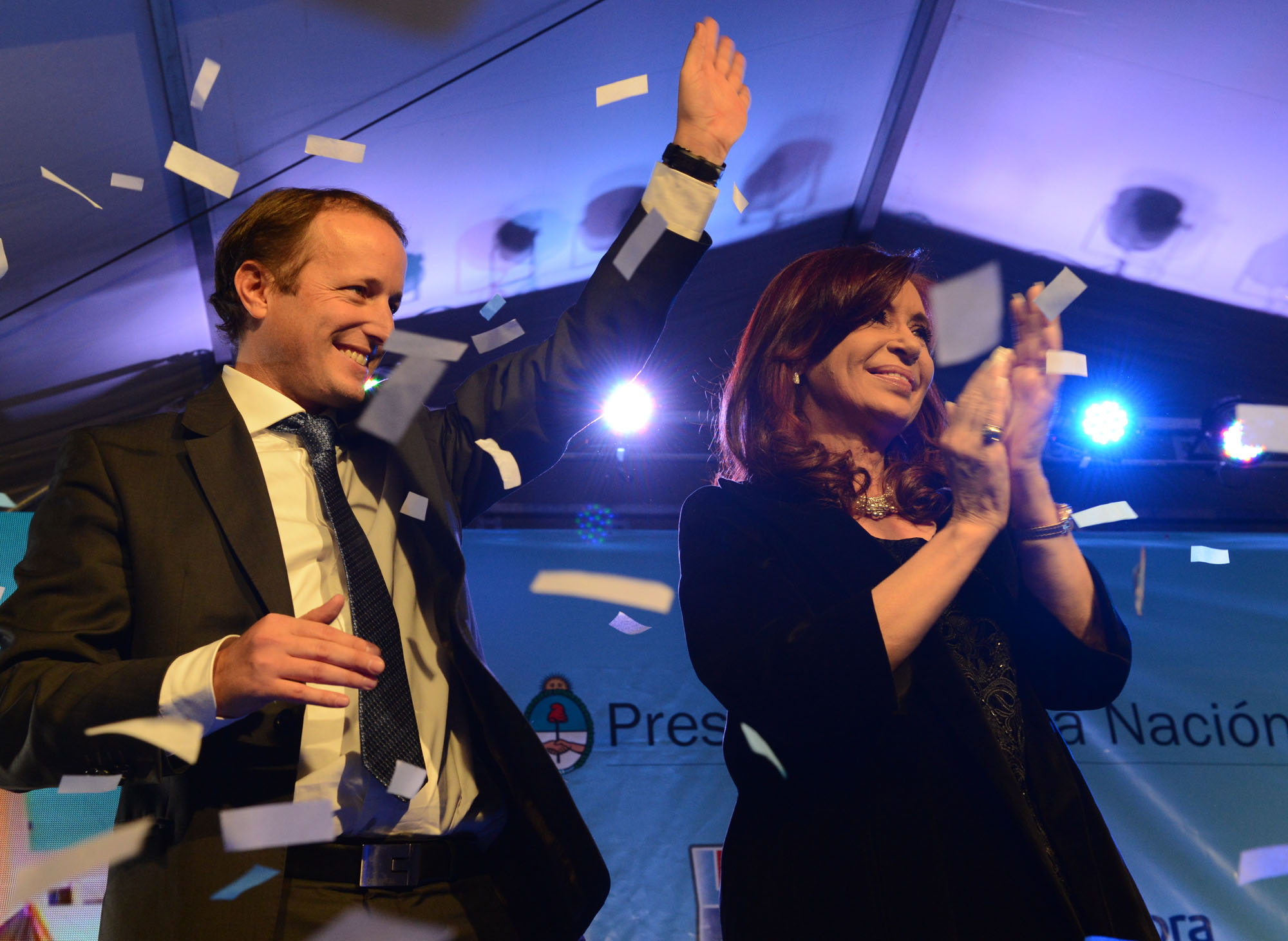 La presidenta Cristina Fernández encabeza el acto de inauguración del Centro de Protección Urbana de Lomas de Zamora.